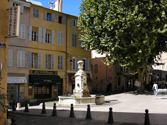 Aix-en-Provence